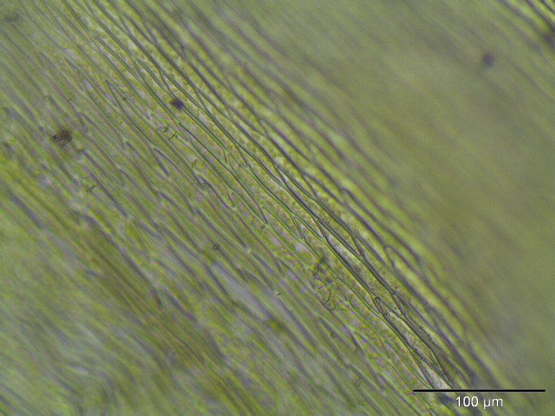 Mauer-Schnabeldeckenmoos (Rhynchostegium murale), Laminazellen, Vergrößerung: 250x